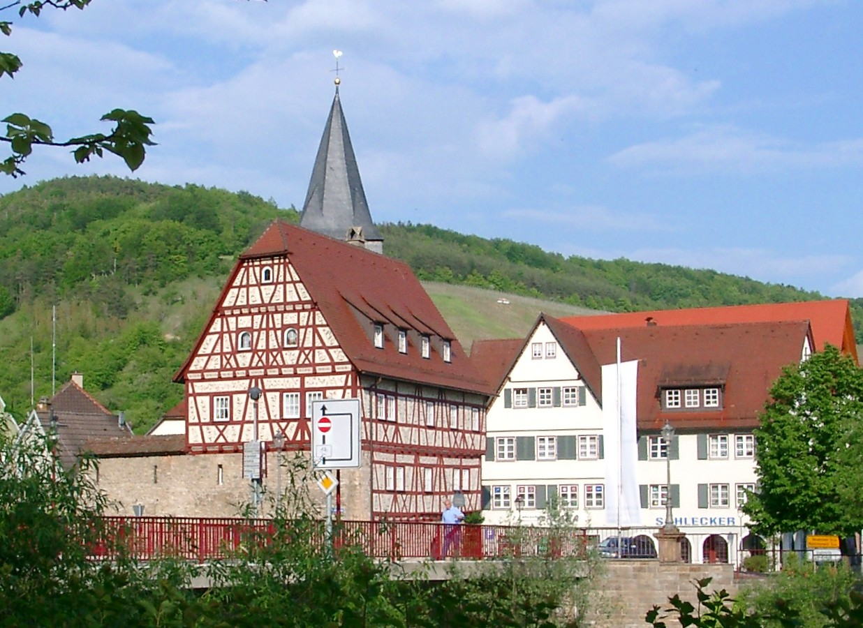 Niedernhall, Goetzenhaus